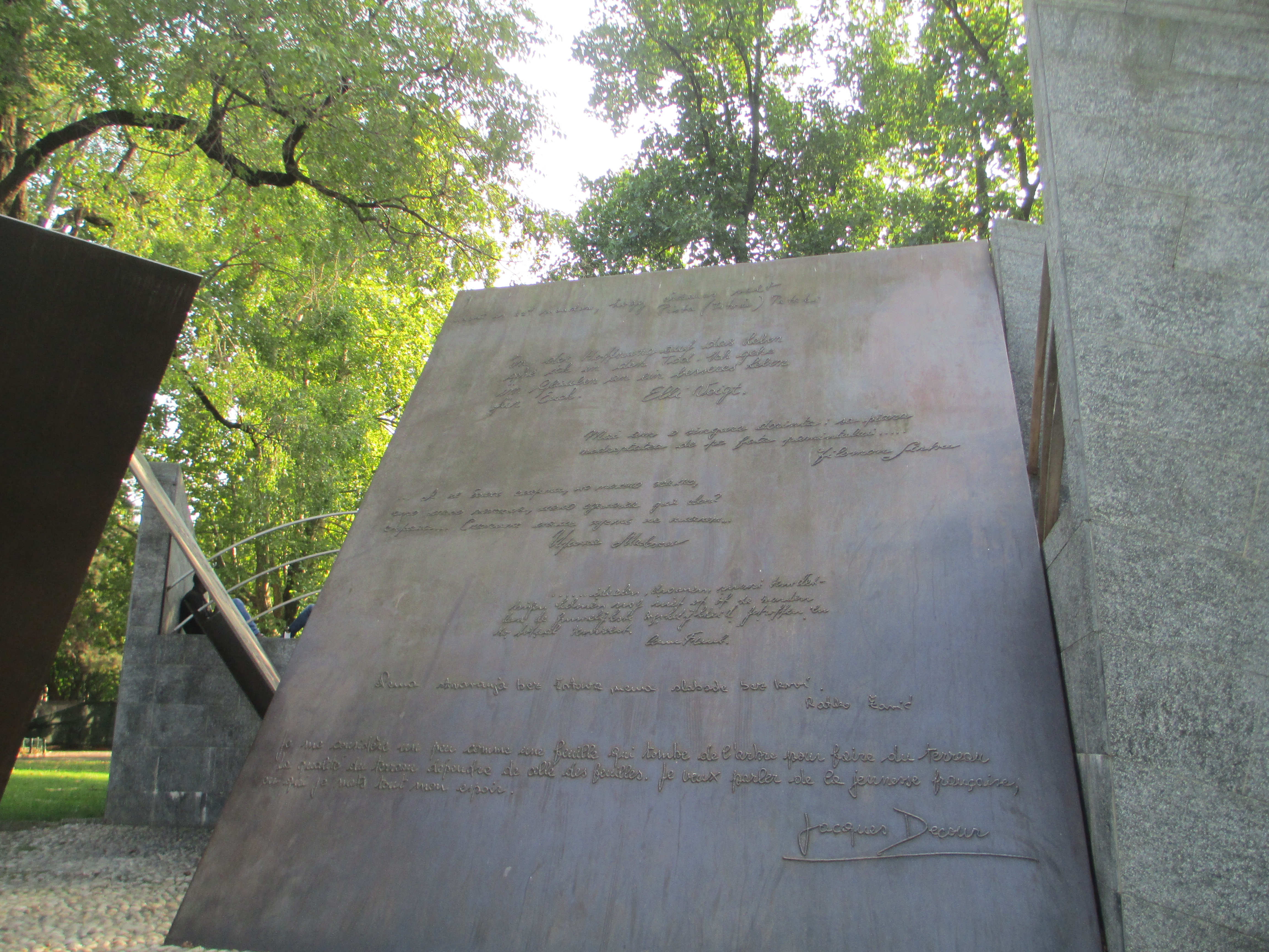 Monumento alla Resistenza europea a Como. This is a photo of a monument which is part of cultural heritage of Italy.